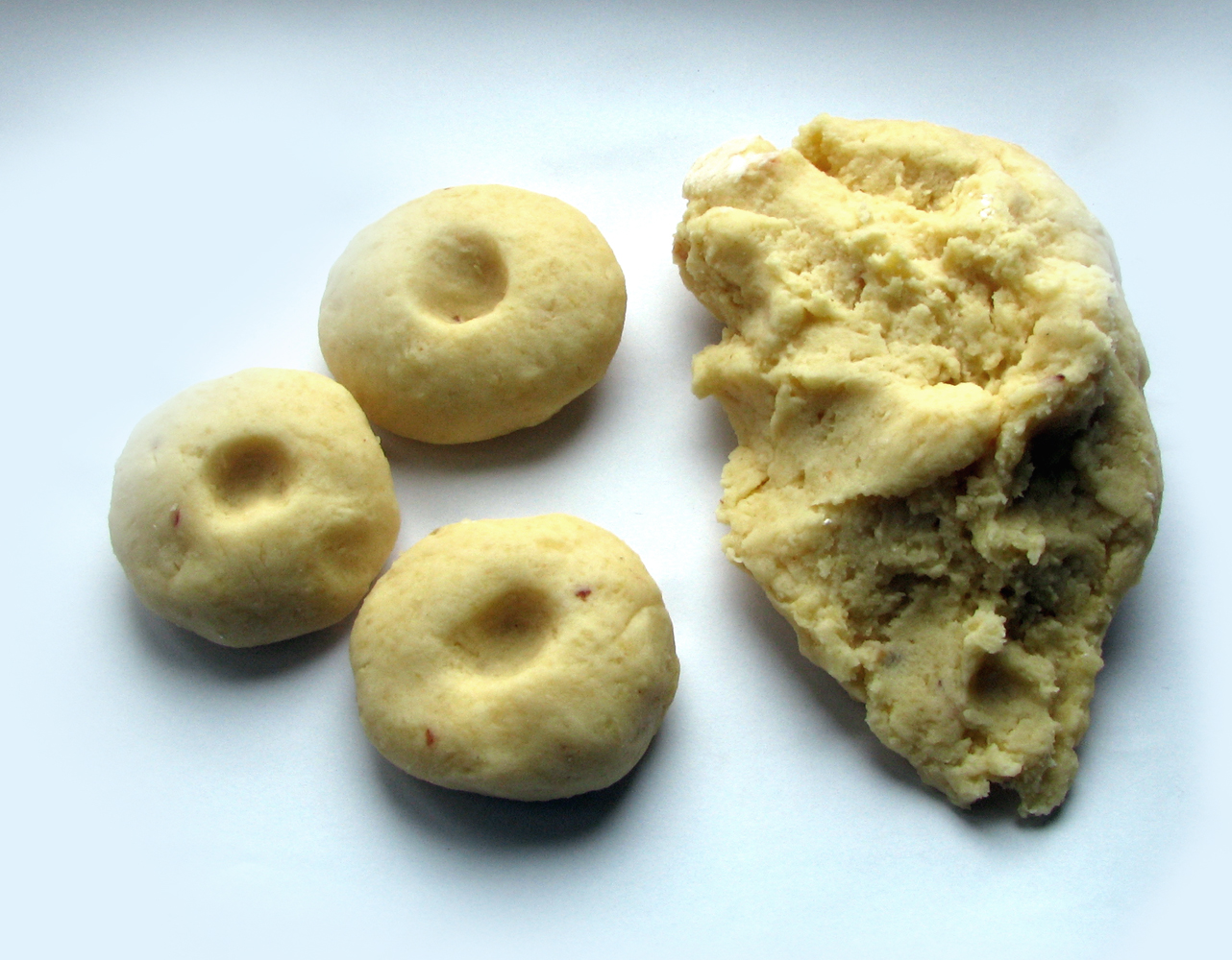 Schlesische Kartoffelklöße im Rohzustand (Teig und geformt mit Delle zum Soße auffangen)